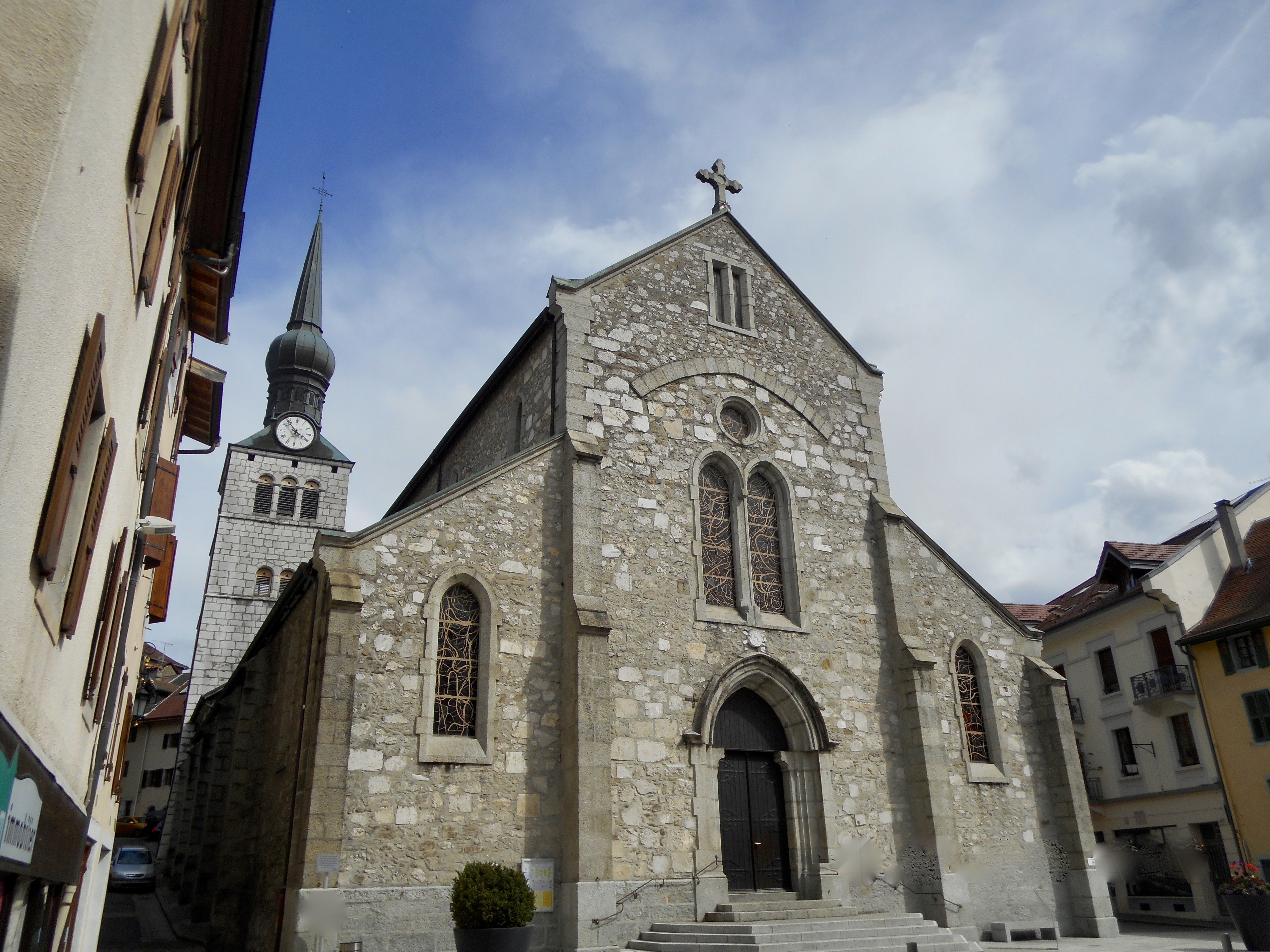 Façade de l'église Saint-Jean-Baptiste de La Roche-sur-Foron, printemps 2019.